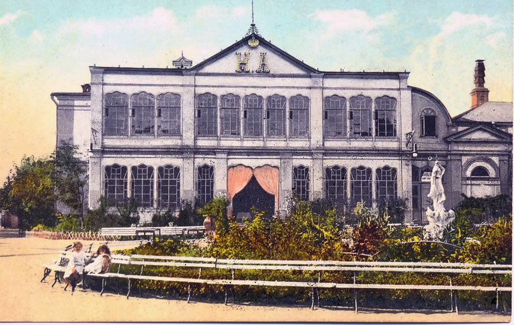 Англійський клуб у Катеринославі.